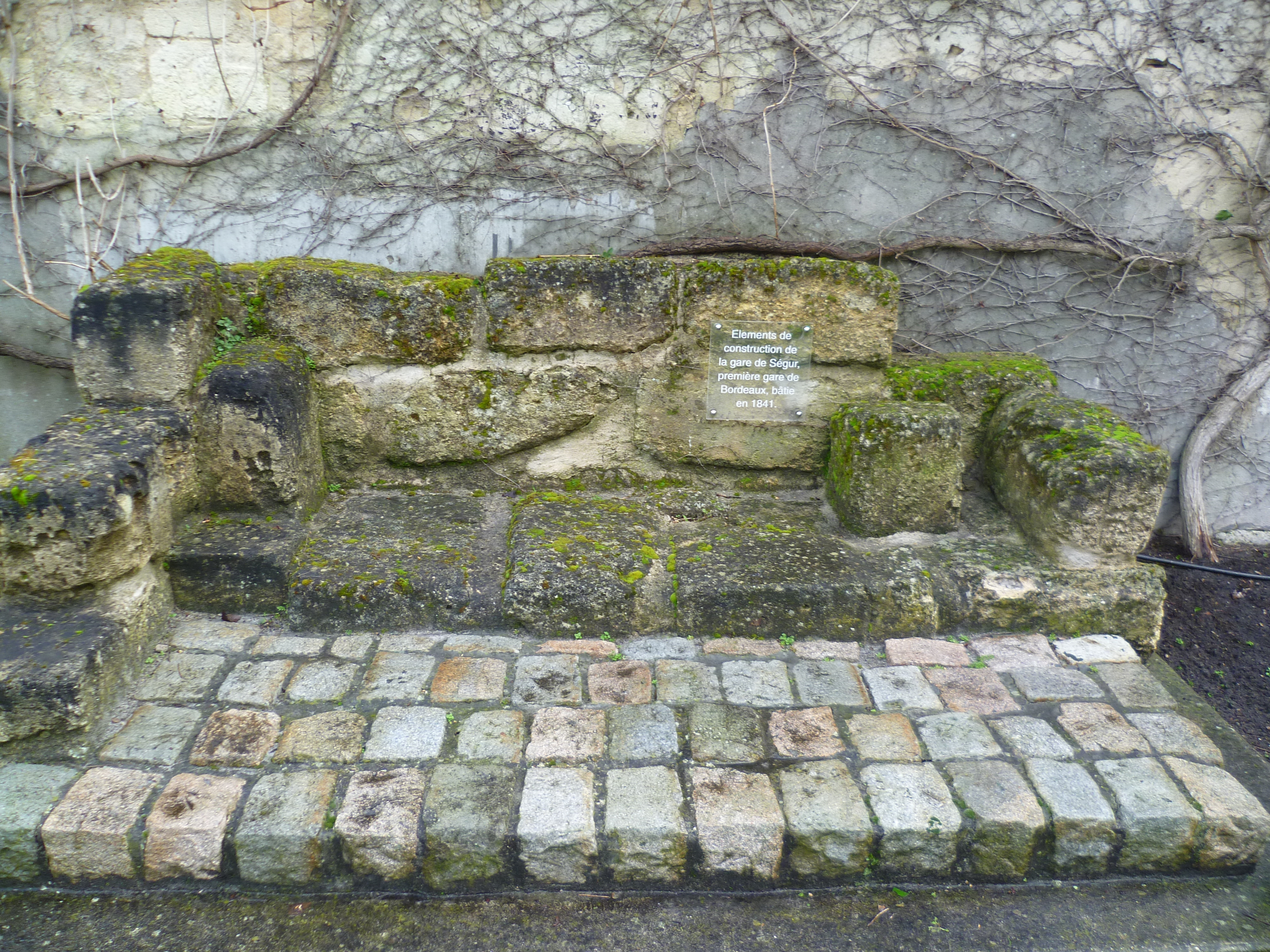 Bordeaux, monument de l'ancienne gare de Ségur.